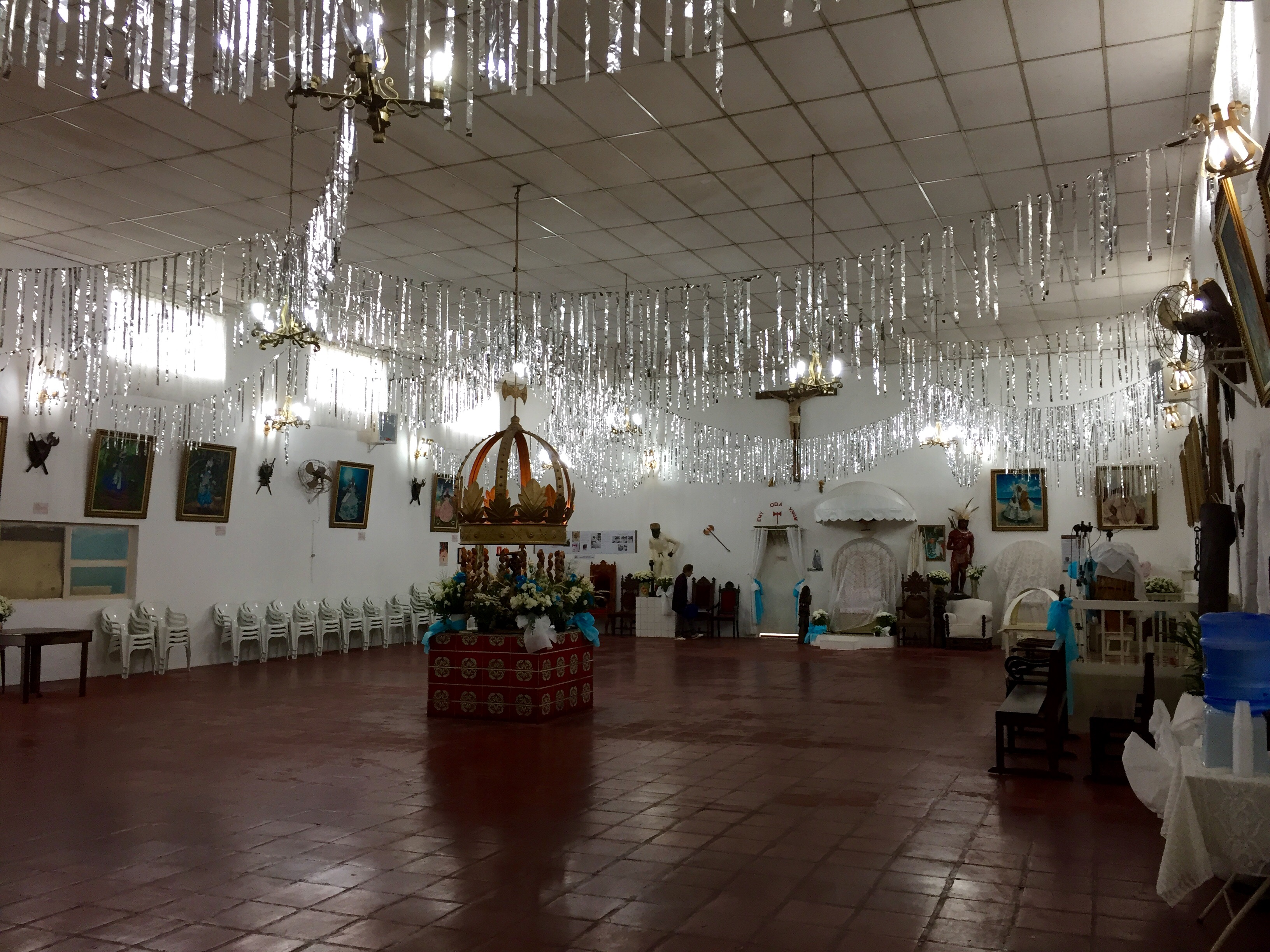 Salão do Axé Ilê Obá, em São Paulo (SP), Brasil.